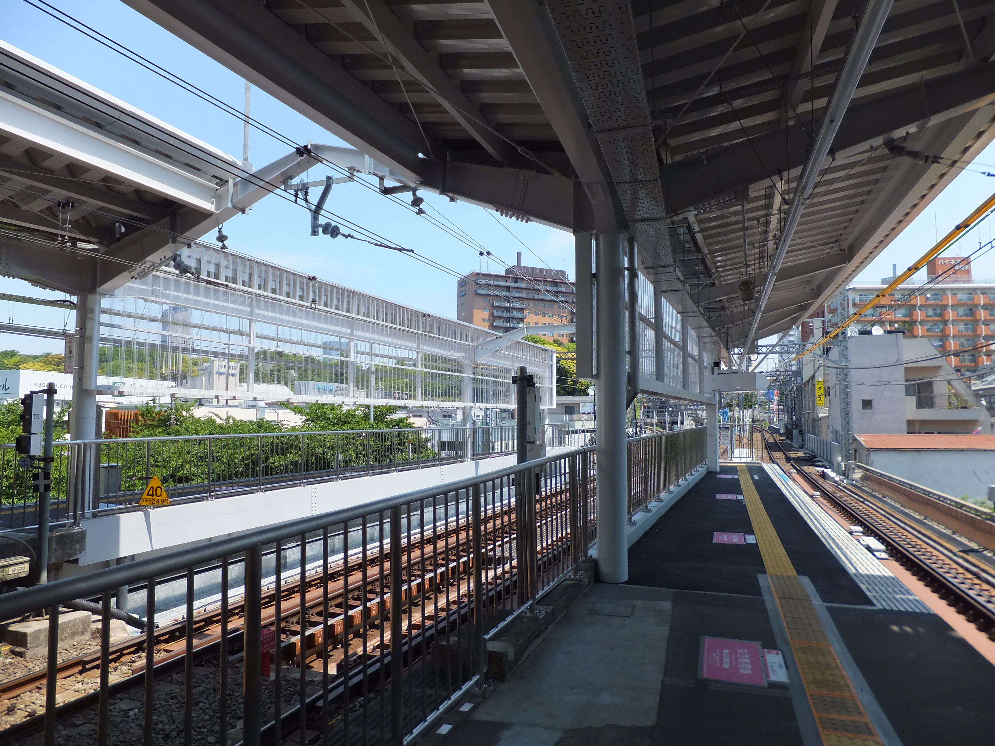 東急東横線・中目黒駅、代官山方のホーム延伸区間。副都心線直通に合わせ、東急東横線内の主要駅は10両編成に対応できるようホームが延伸された。なお、中目黒駅は東横線の線路(20m車・10両)が東京メトロ日比谷線の線路(18m車・8両)を挟む構造となっており、ホーム延長区間では日比谷線側に柵が設けられている。